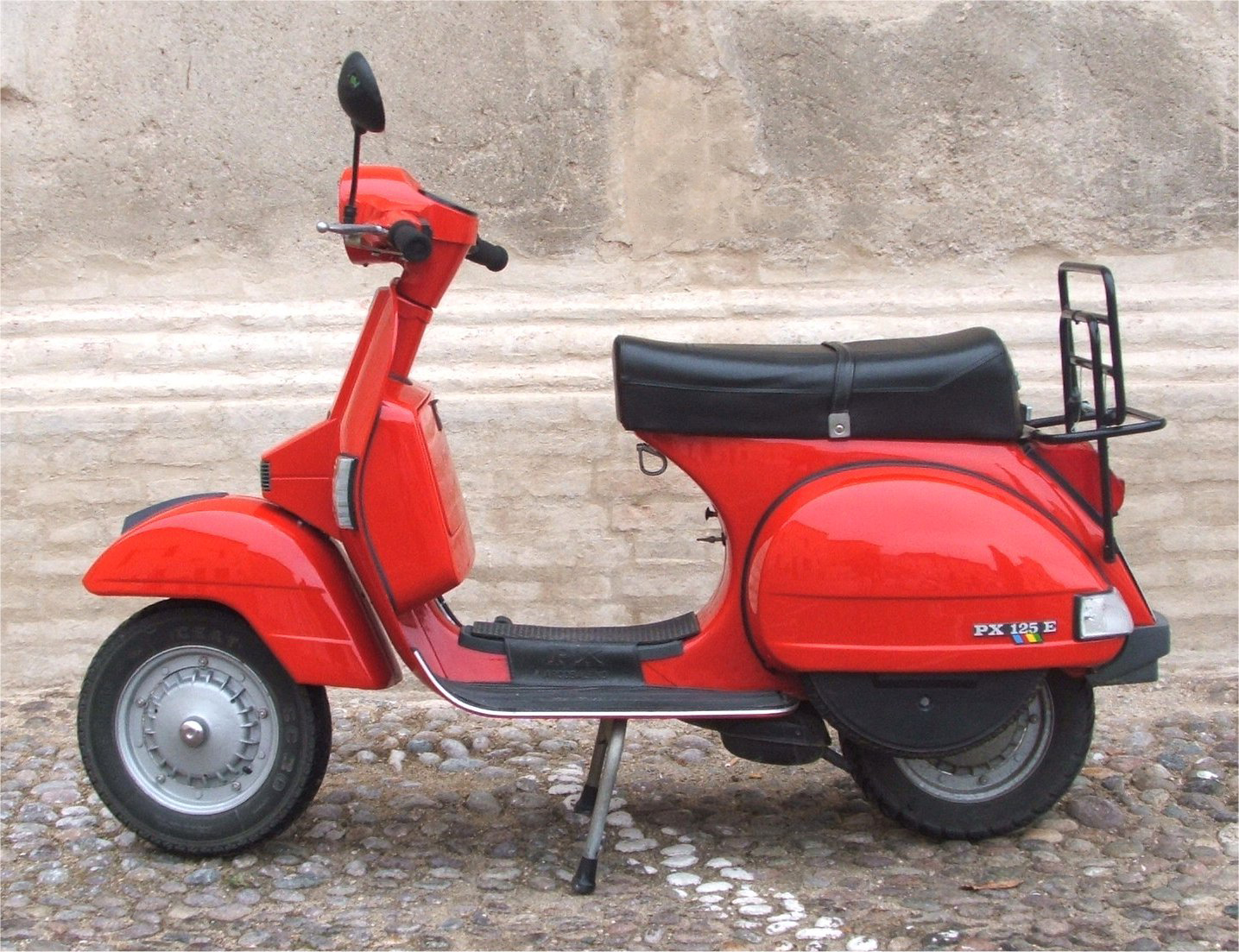 Piaggio Vespa PX 125 E Arcobaleno del 1984 fotografata al Raduno Moto Storiche di Medole nel 2007